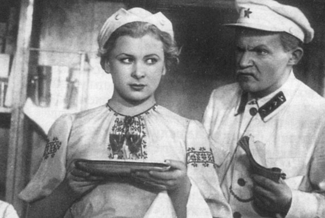 Валентина Серова в фильме Константина Юдина «Девушка с характером»